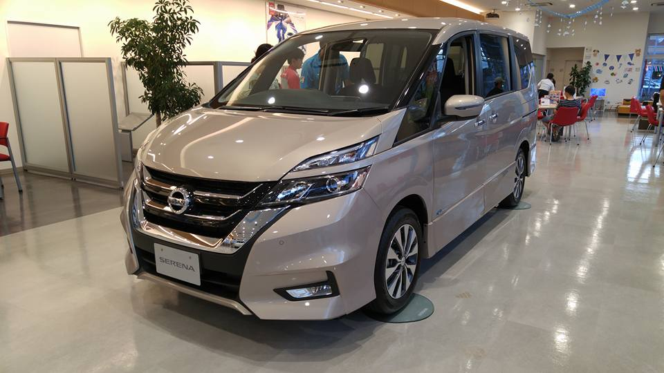 日産セレナ